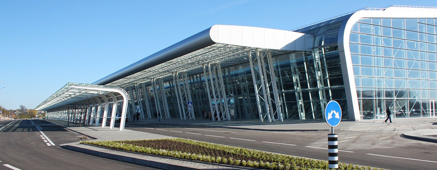 LWO Airport Terminal